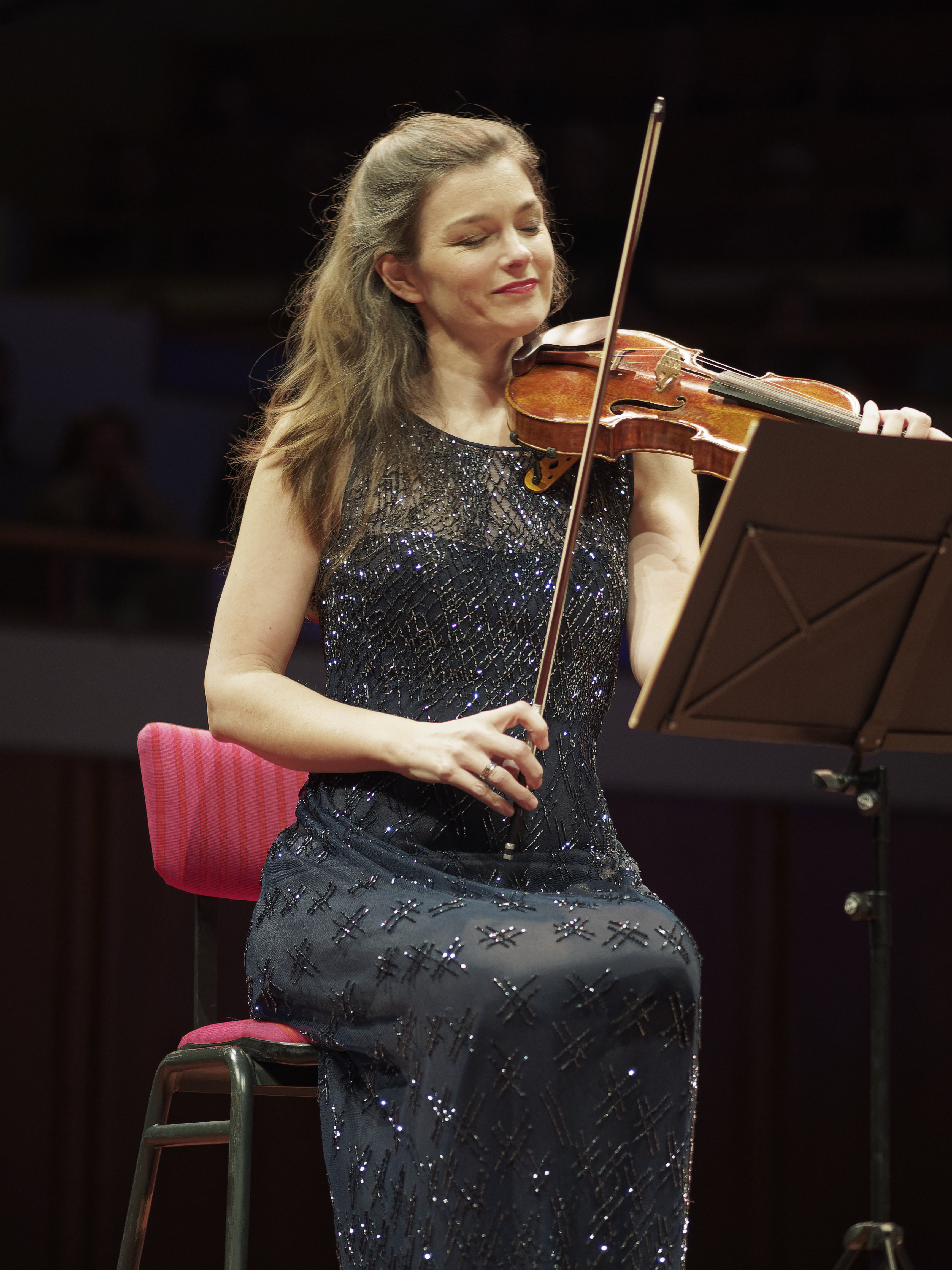 Janine Jansen Janine Jansen tijdens het Internationaal Kamermuziek Festival te Utrecht in 2019